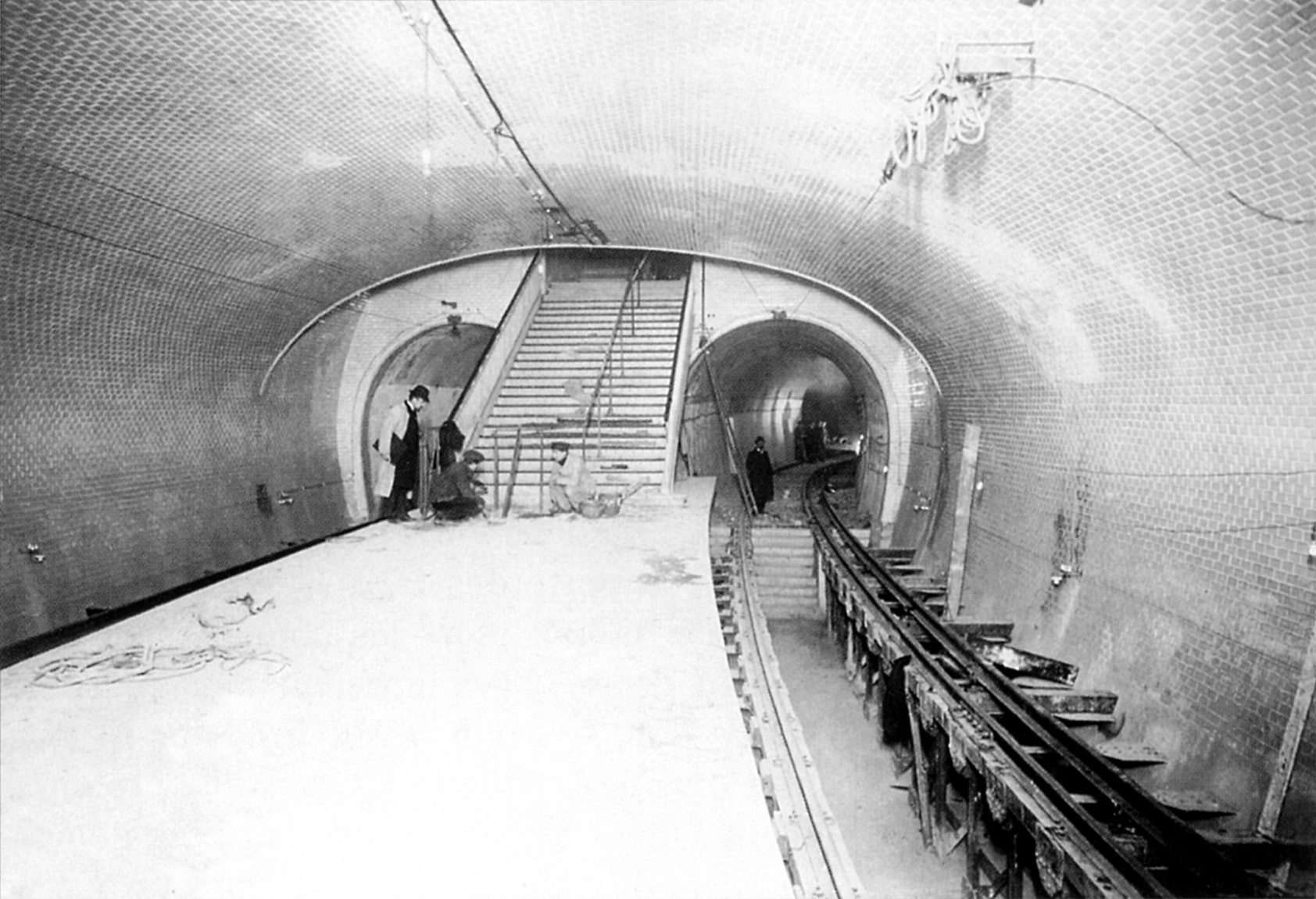 Photo du quai départ de la station Gambetta de la ligne 3 du métro de Paris (actuel quai terminus de la ligne 3bis), France.